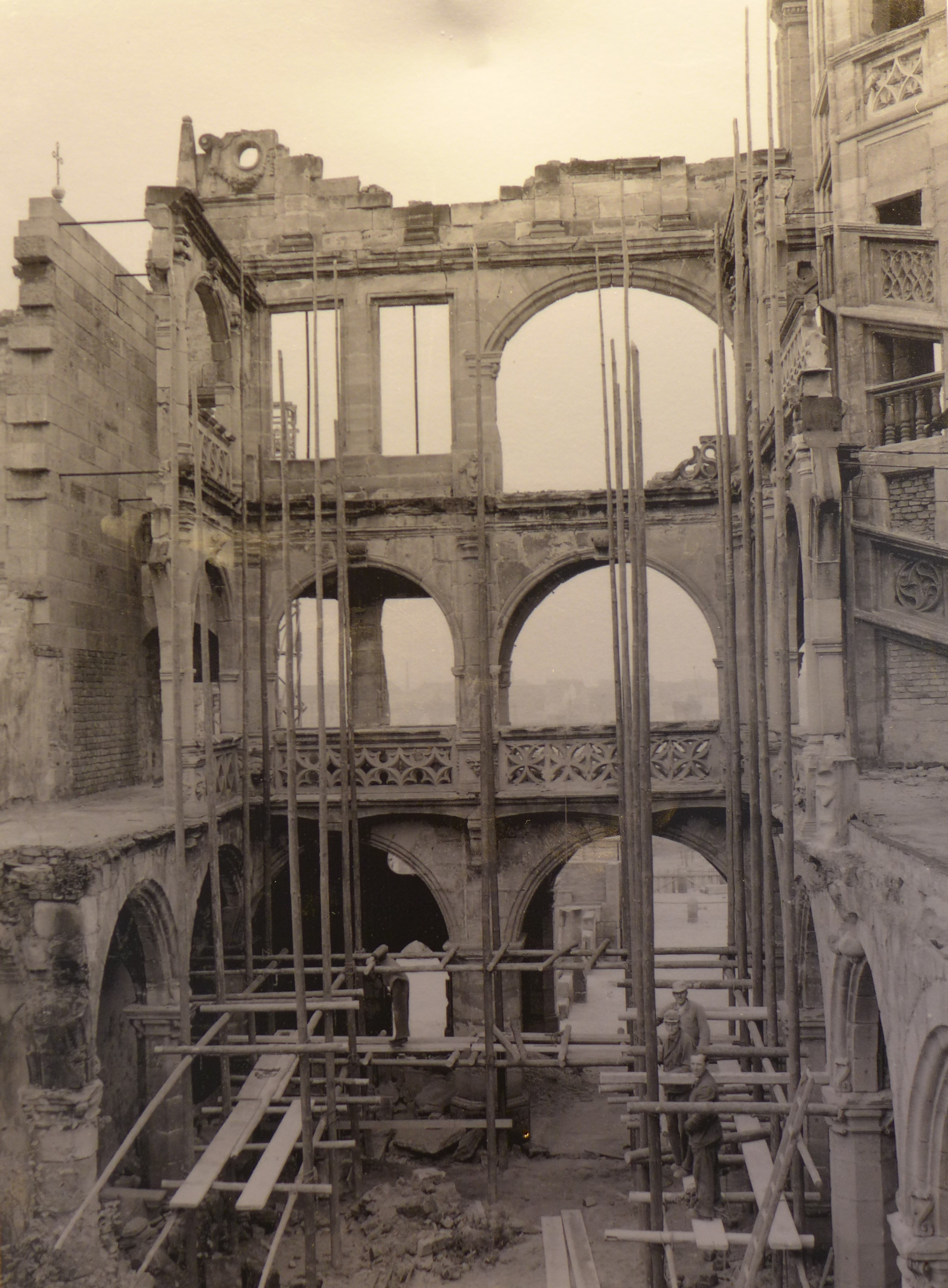 Pellerhaus Nürnberg, Zustand beim Beginn des Wiederaufbaues (Stadtarchiv Nürnberg)